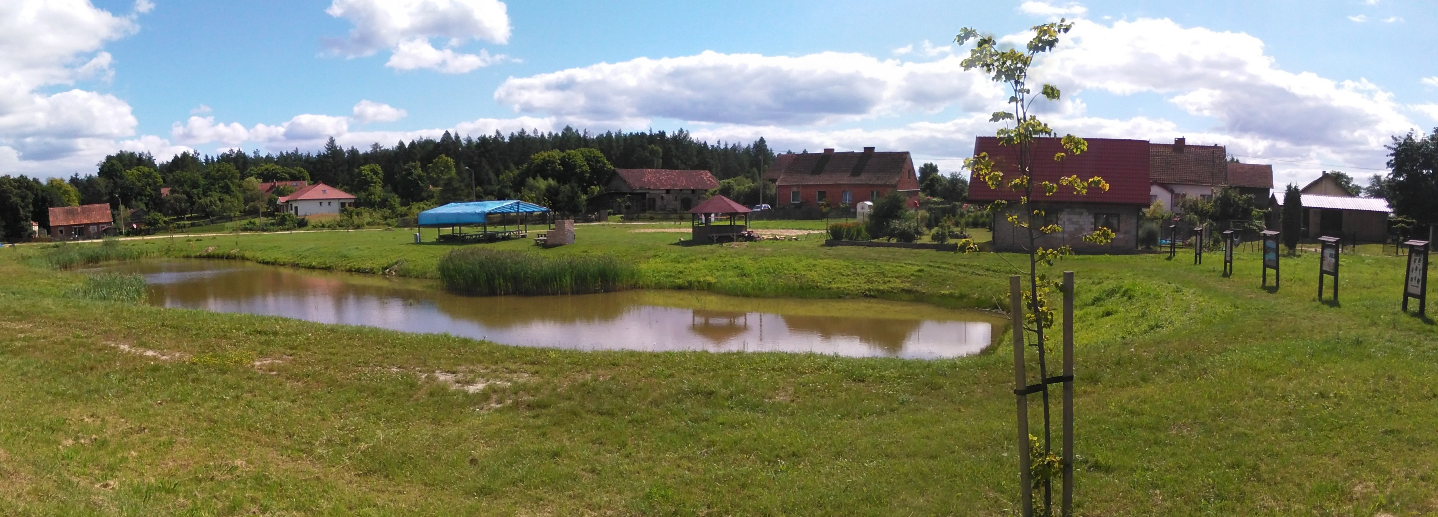 Wieś Lipowo Kurkowskie